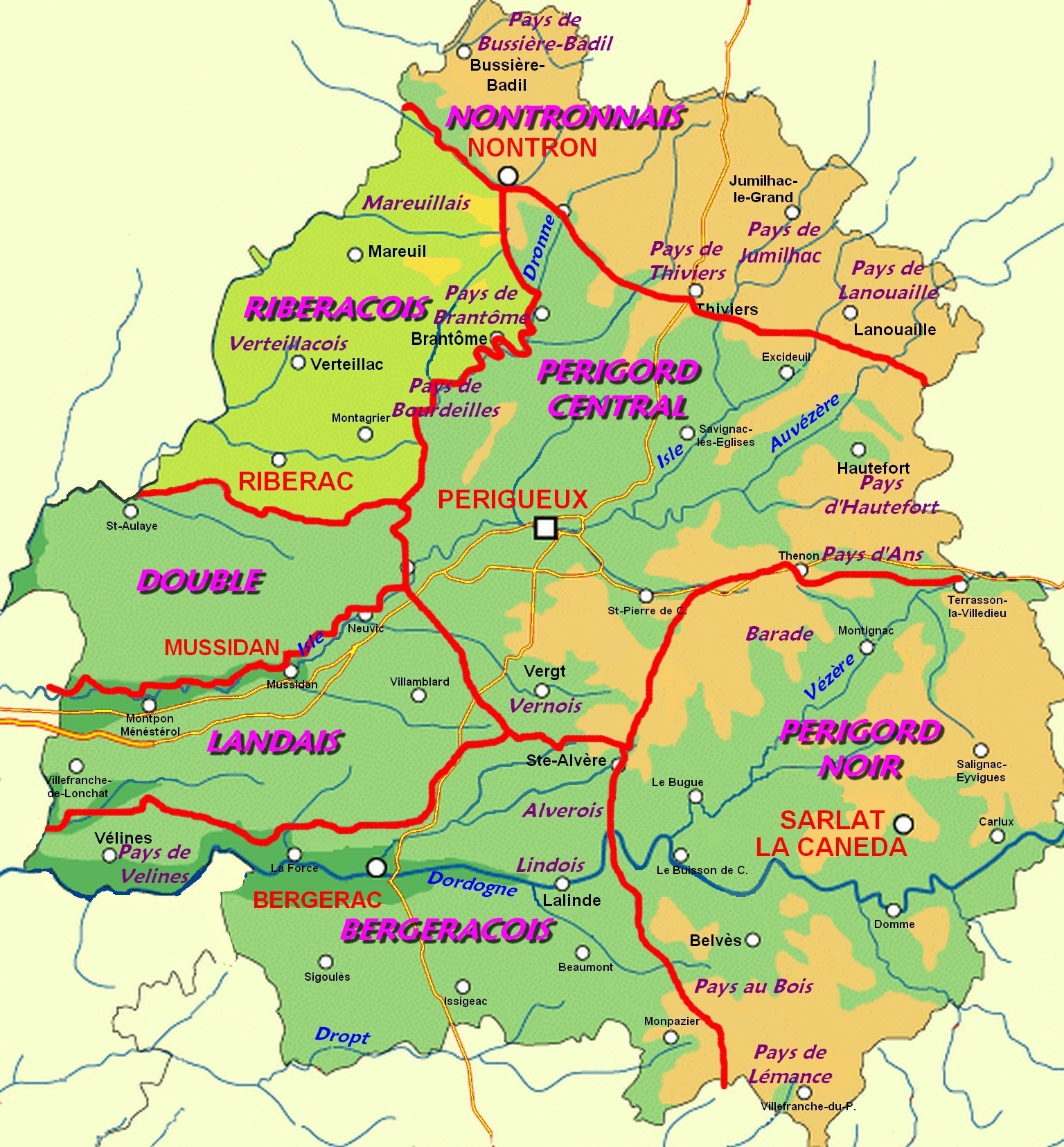 Localisation du Robéracois sur la carte des pays traditionnels du Périgord.